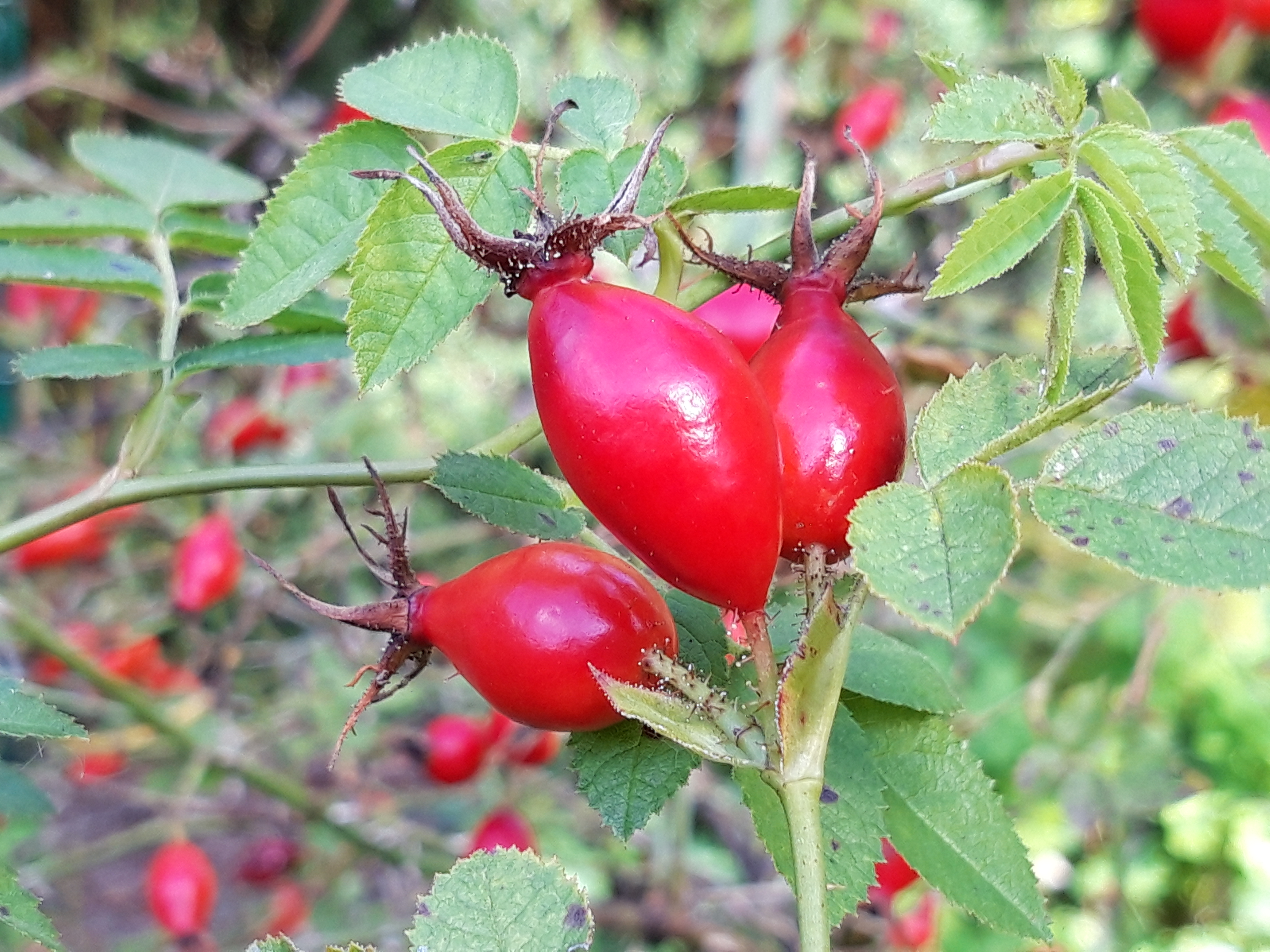 rozebottels rosa sicula hortus leiden september 2018